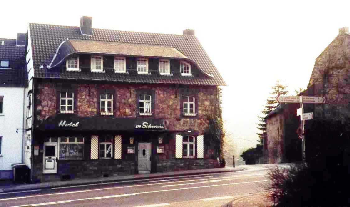 Hotel Schwan in Röhe Ecke "Fauler Hering"